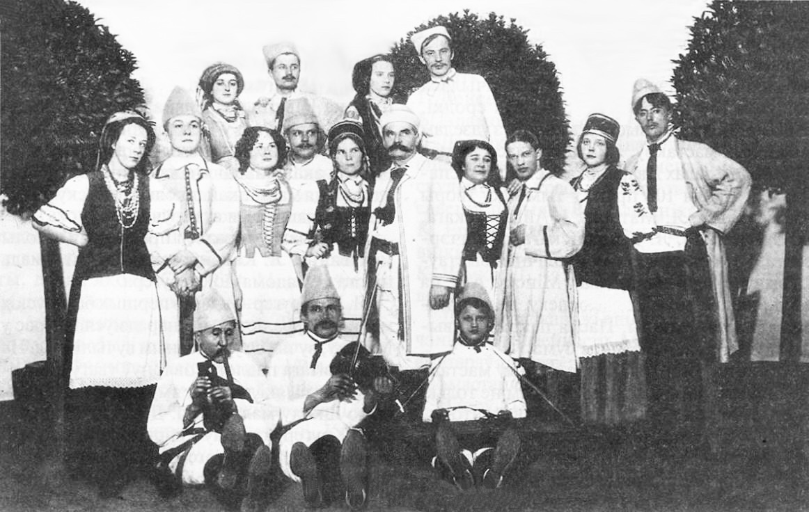 Трупа Буйніцкага пасля выступлення ў Спорцінг-Палацы, 1912